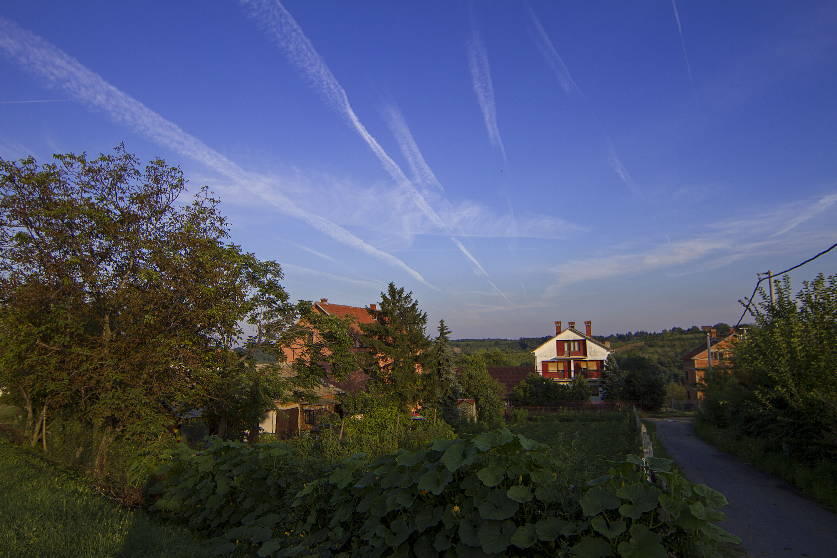 Брестовик, поглед са смедеревског пута.